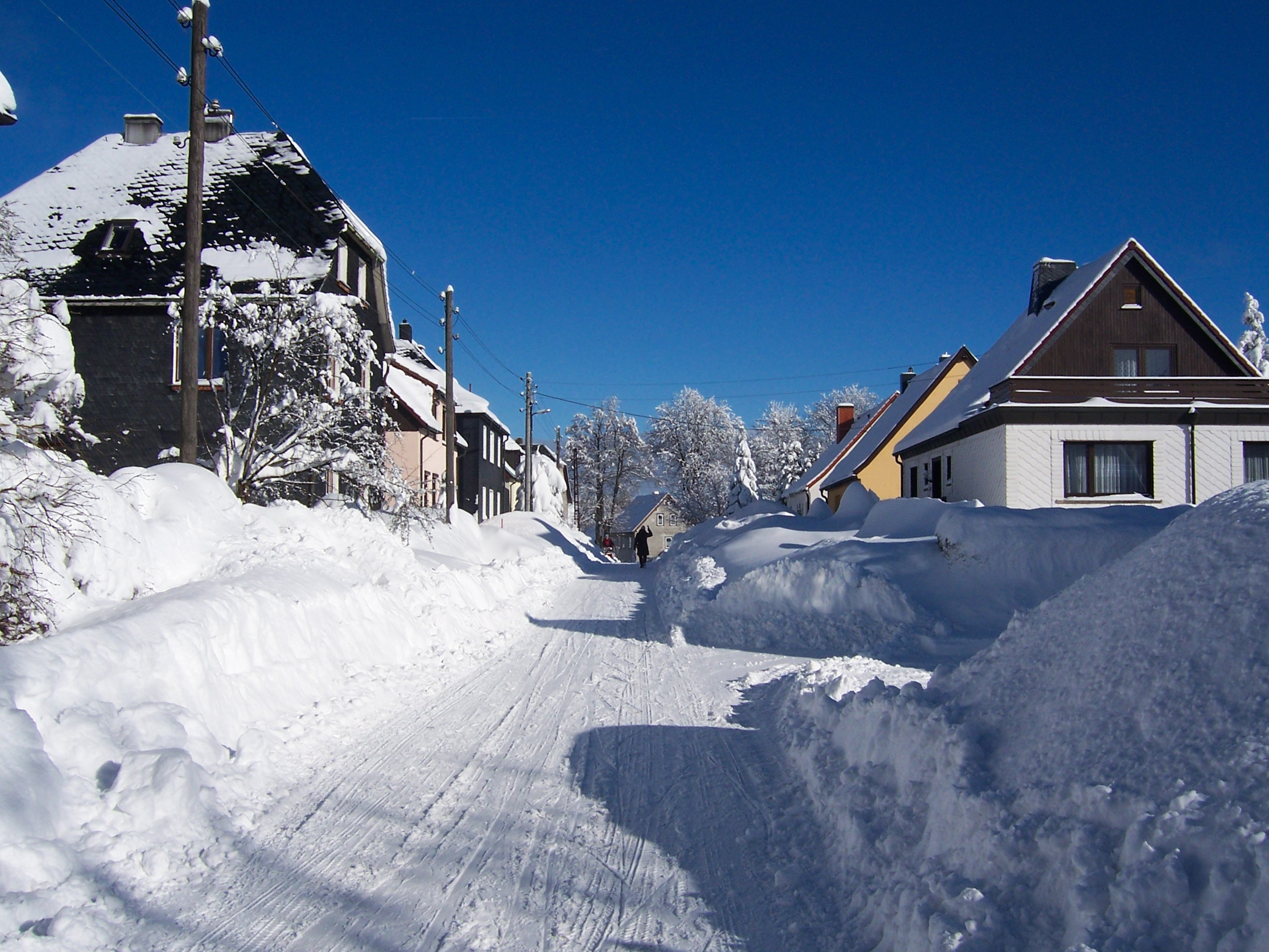 Nach den starken Schneefällen der vergangenen Wochen wurde der Einsatz des Schneepflugs im Februar 2010 zunehmend schwieriger, da die Straßenränder bereits vollkommen zugeschoben waren. Daher mussten einige Straßen mit der Schneefräse geräumt werden.